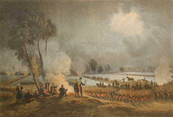 Il secondo Corpo Francese Mac-Mahon passa il Ticino a Turbigo, ridotto e ritoccato, litografia